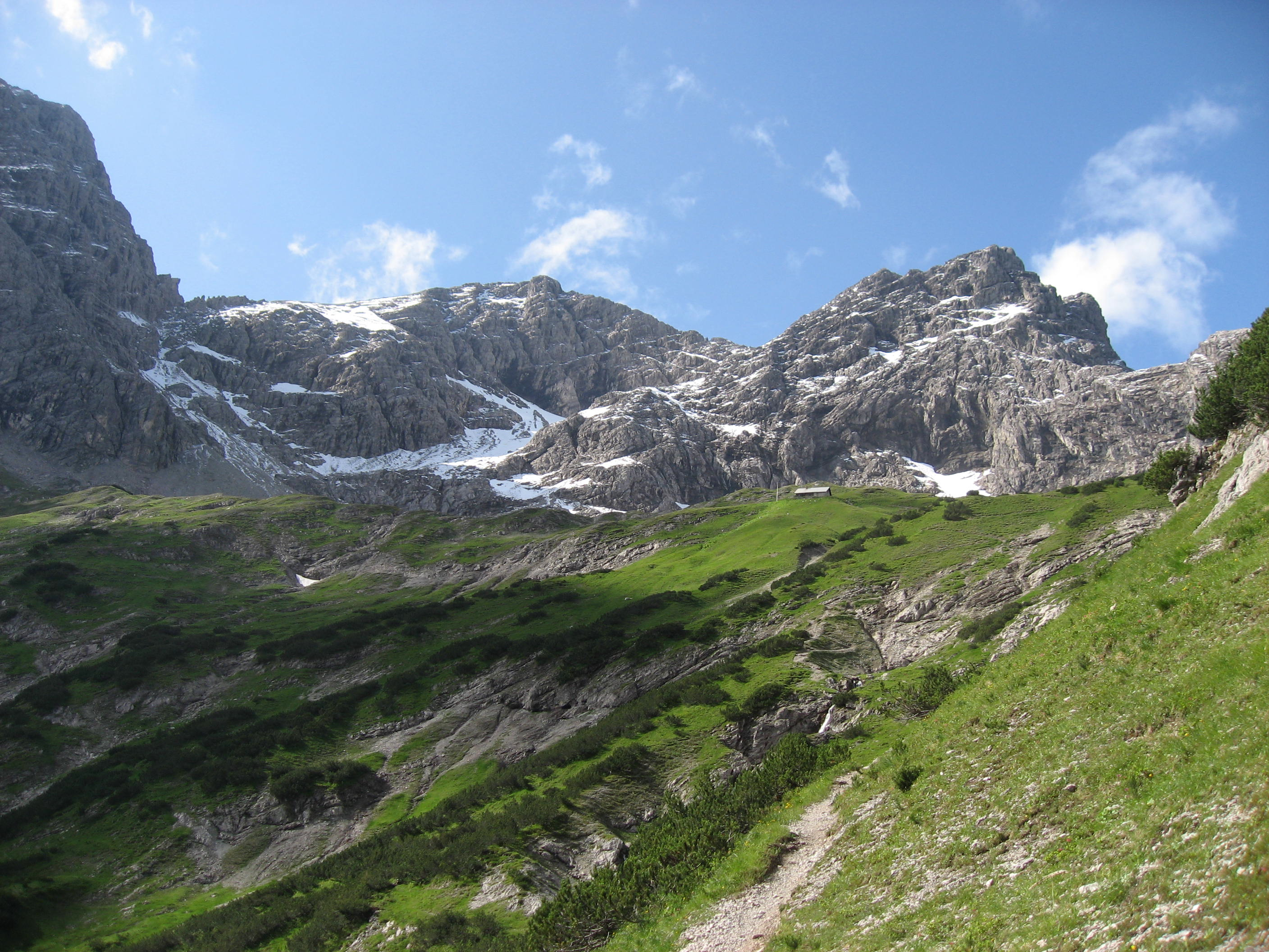 Blick auf den breiten Gipfel der Bretterspitze (2608 m, Mitte) in der Hornbachkette. Links ist die Urbeleskarspitze angeschnitten. Rechts die Gliegerkarspitze, davor das Kaufbeurer Haus (2007 m).